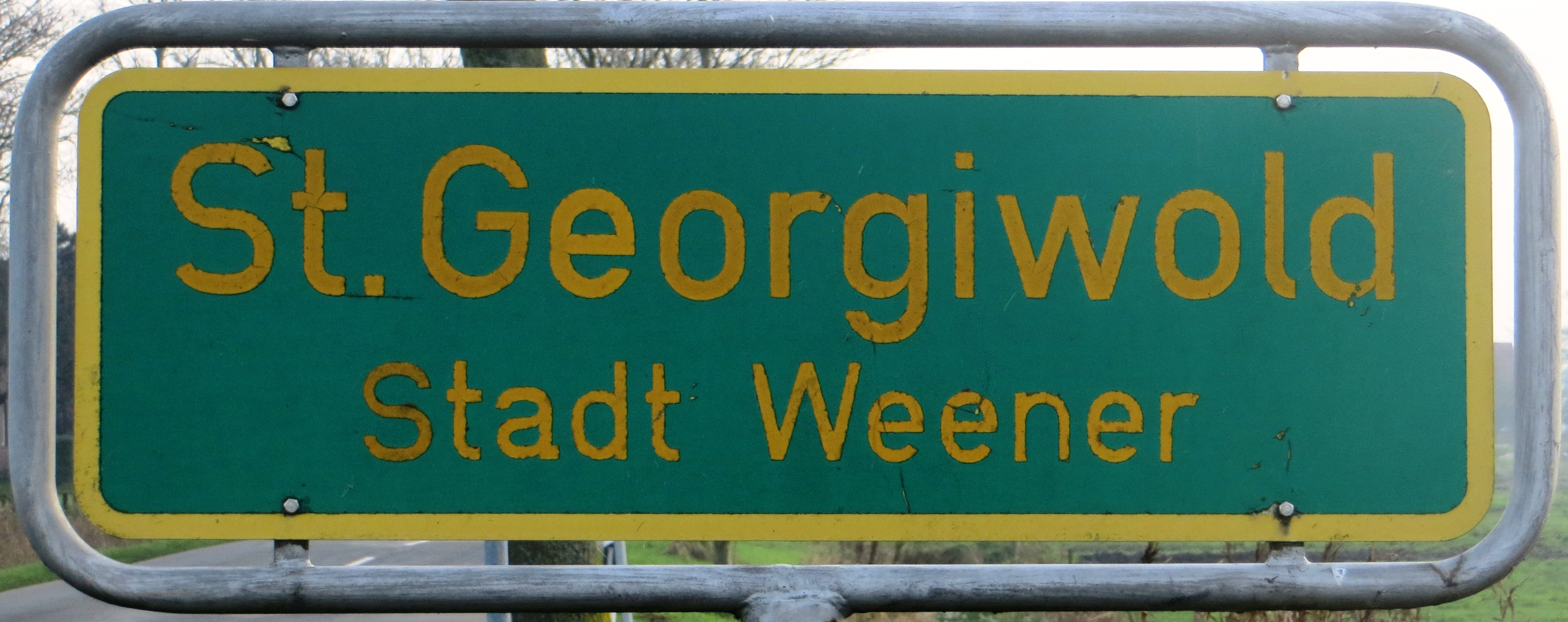 plaatsnaambord St. Georgiwold